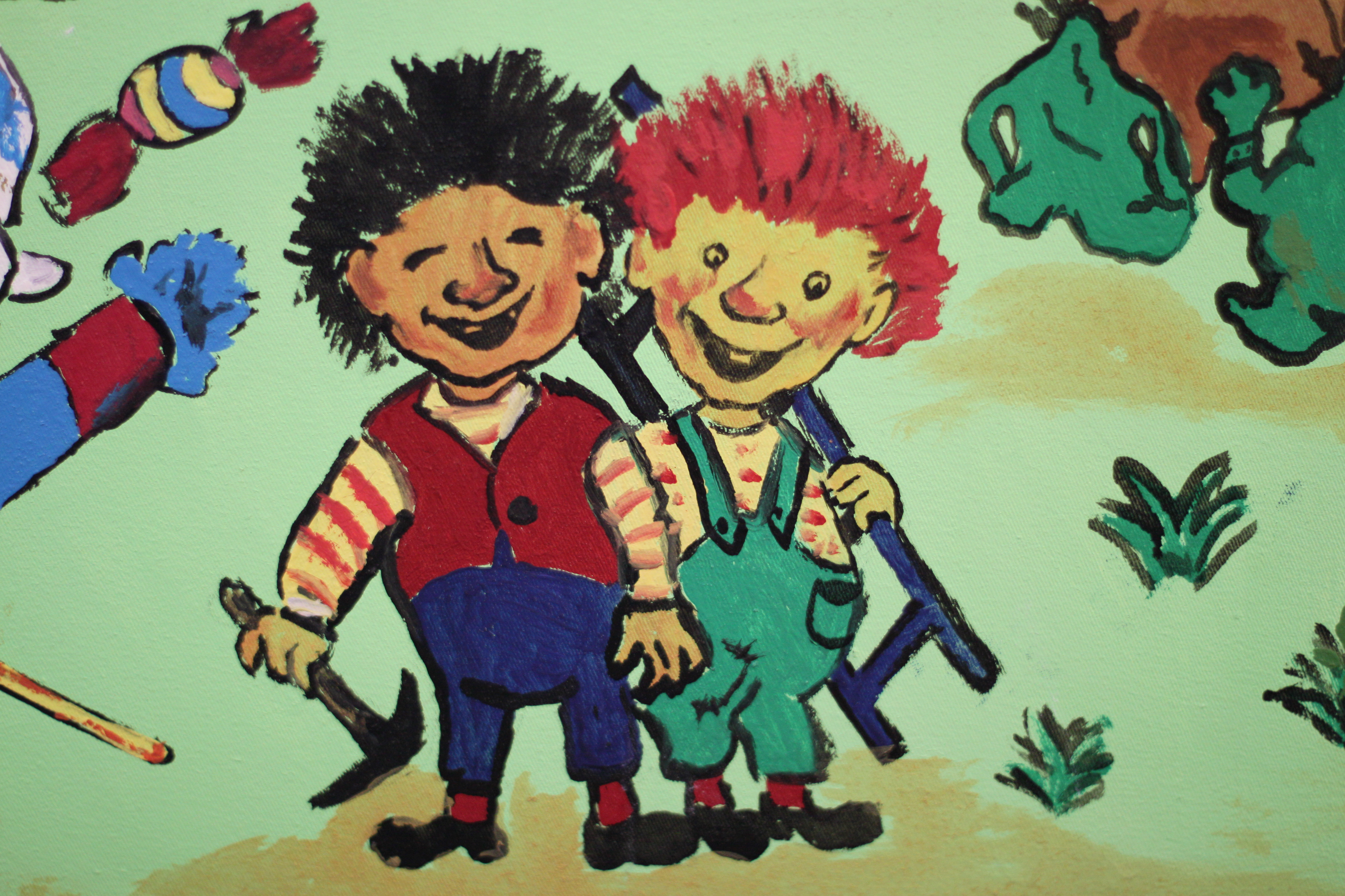 Karius und Baktus; eigene Zeichnung, Ölbild - in eigenem Besitz, die Figuren sind der Kinderbuchillustration zu Karius und Baktus nachempfunden